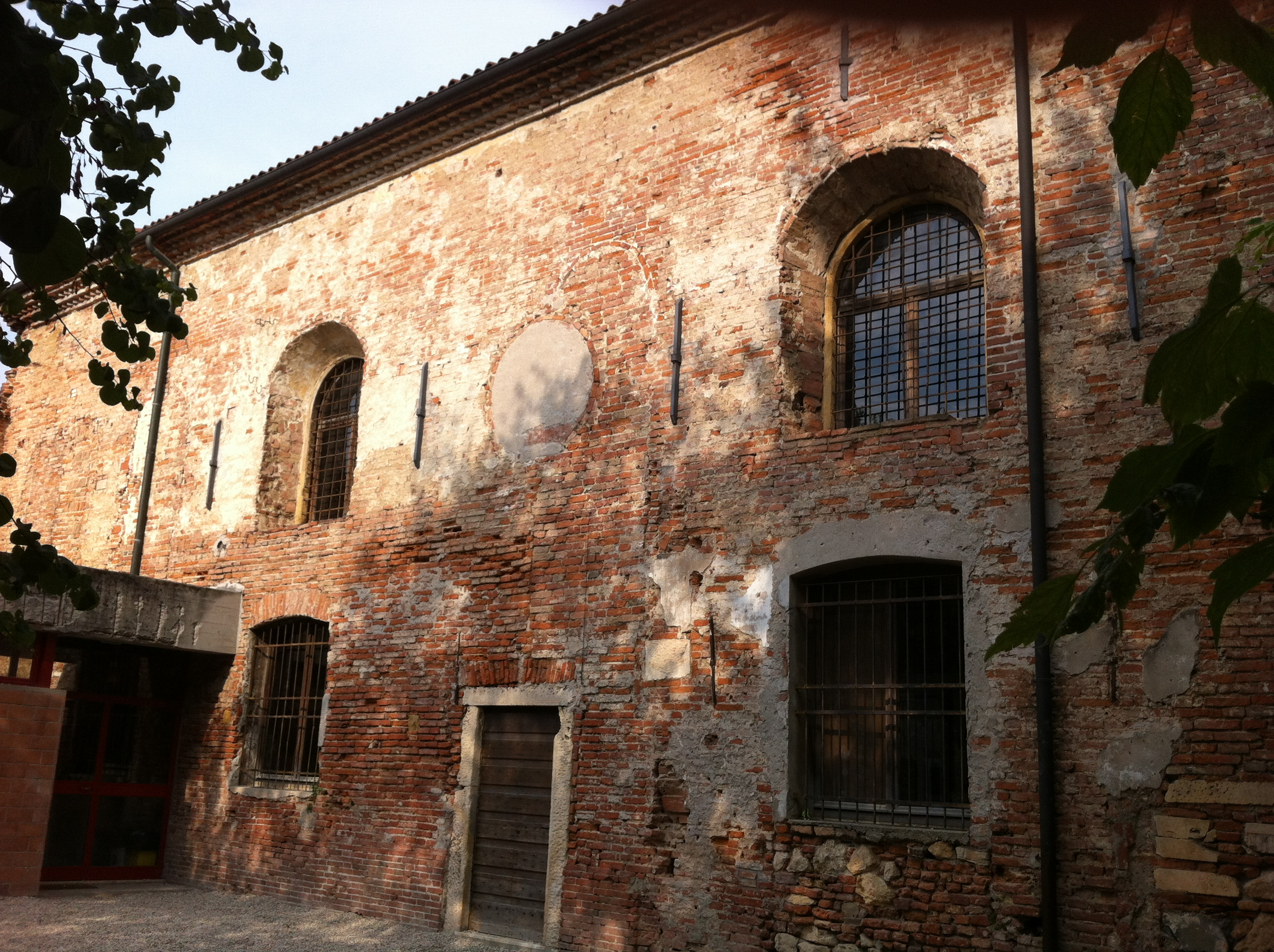 Resti della chiesa appartenente all'antico convento di San Francesco Nuovo a Vicenza (oggi utilizzata come palestra di boxe, in precedenza come palestra della scuola primaria "Luigi da Porto").